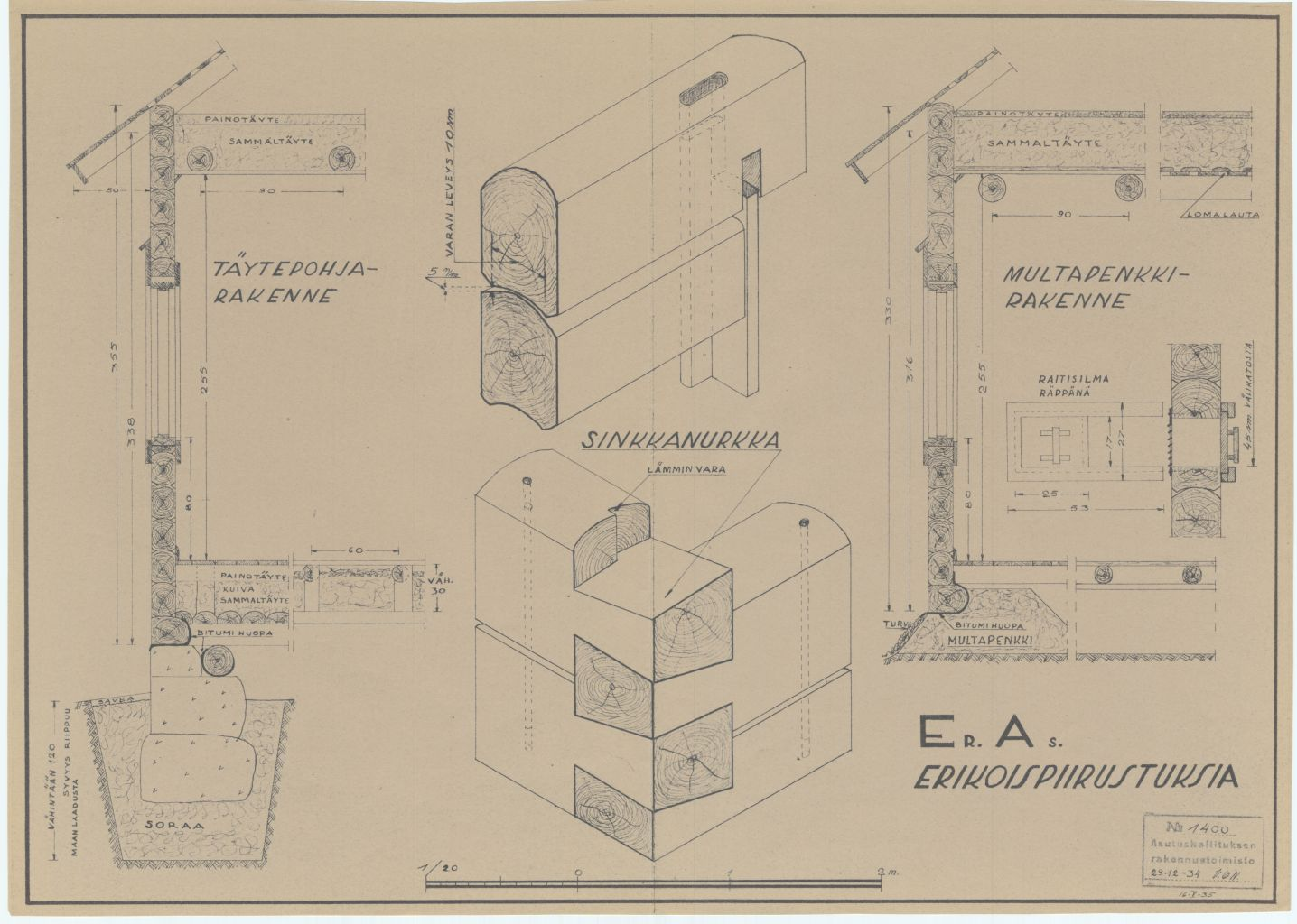 Asutushallituksen tyyppien "Er.As." rakennedetaljeja.